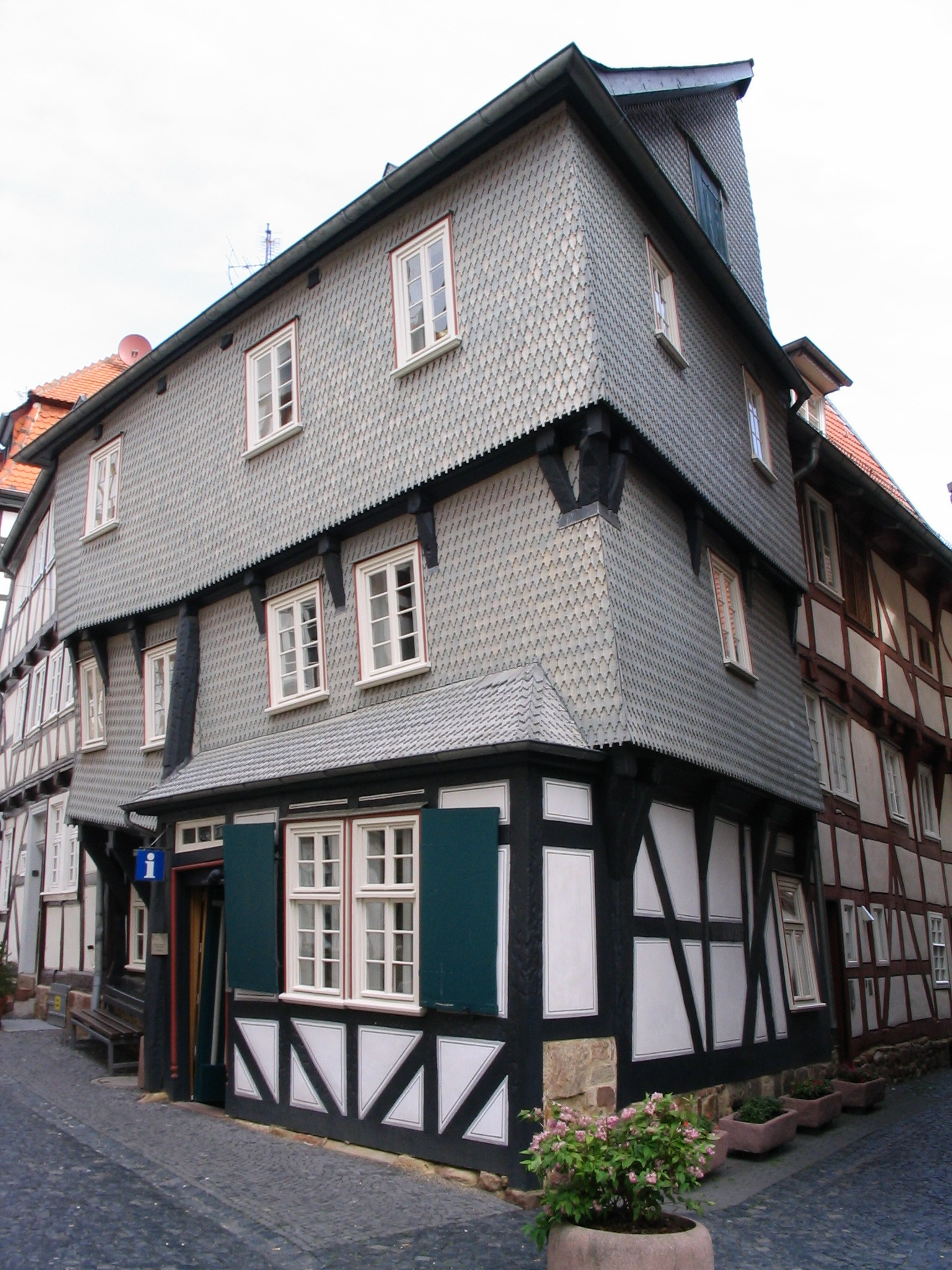 The "Spitzenhäuschen" in Fritzlar, Hesse/Germany